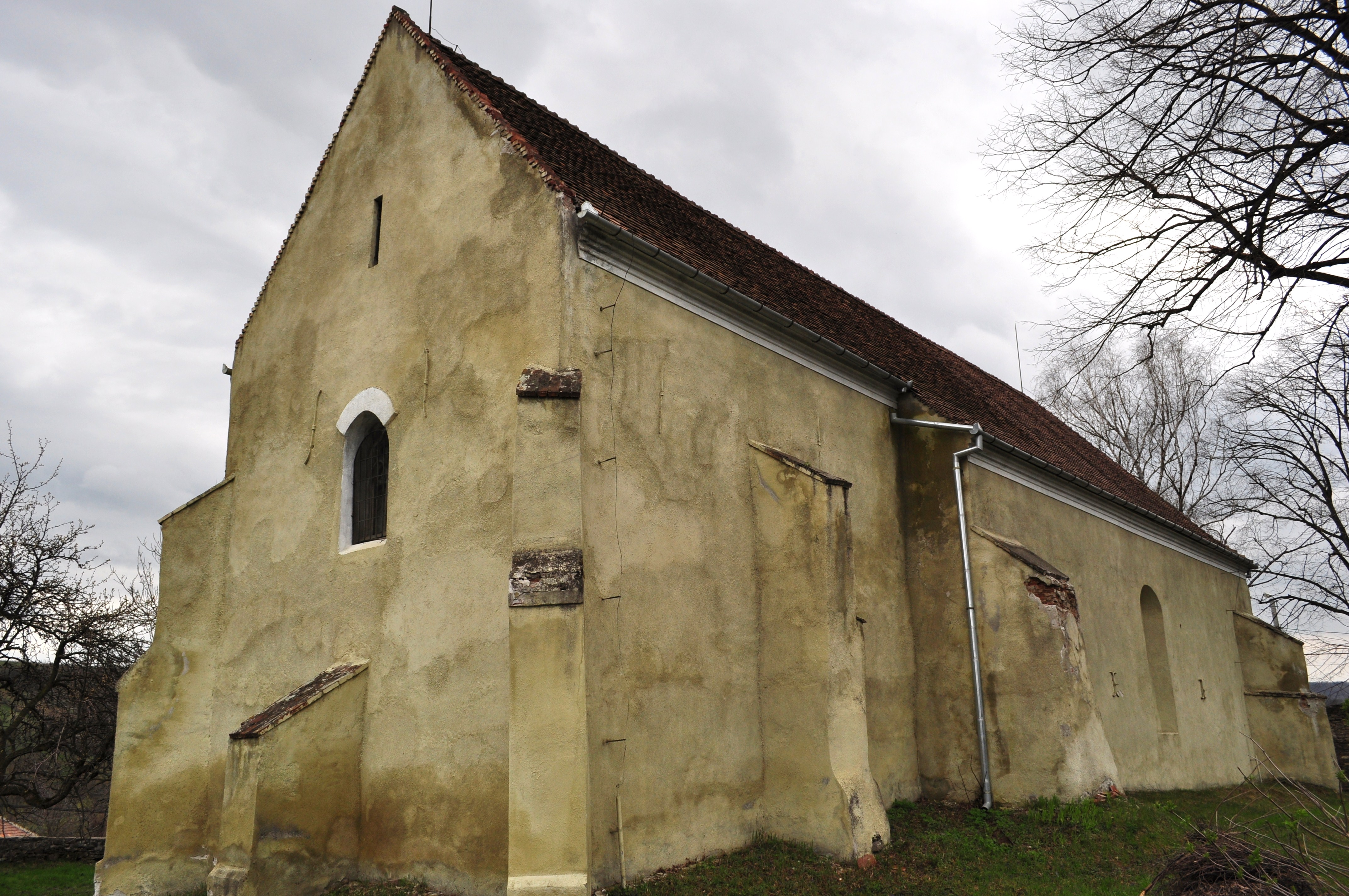 Biserica evanghelică, sat VALEA LUNGĂ; comuna VALEA LUNGĂ, județul Alba 01